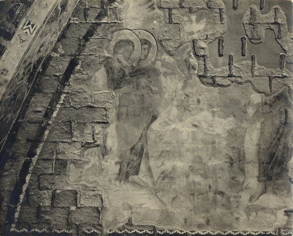 Giotto o pietro cavallini, battesimo di Cristo